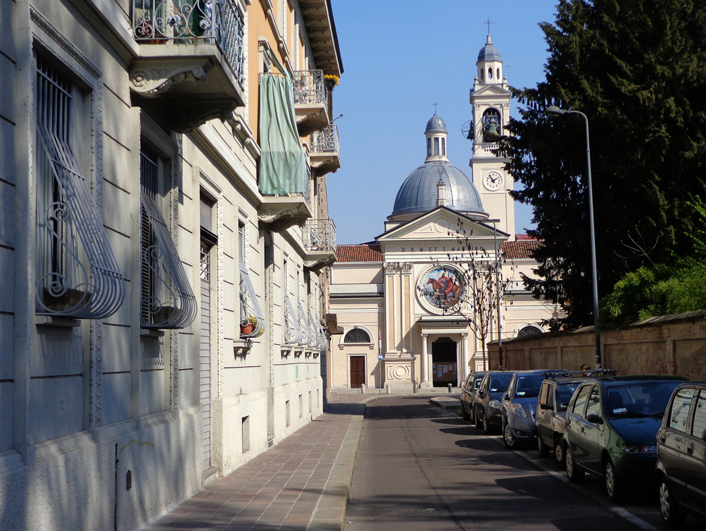 Milano, scorcio del vecchio nucleo di Villapizzone (la via omonima).